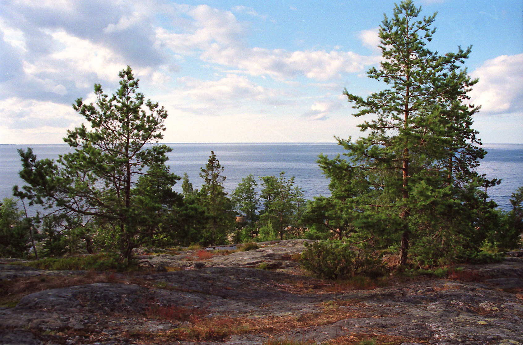 Kapplasse naturreservat